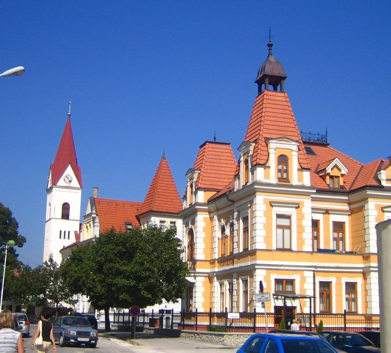 Trencianskie Teplice